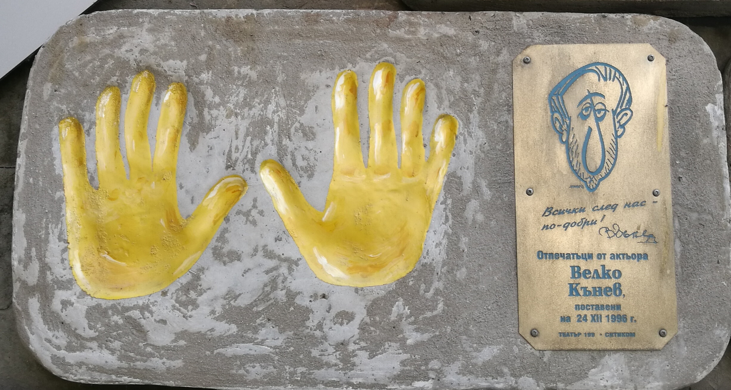 Стената на славата пред Театър 199 - пано с отпечатъци, послание и шарж на Велко Кънев.